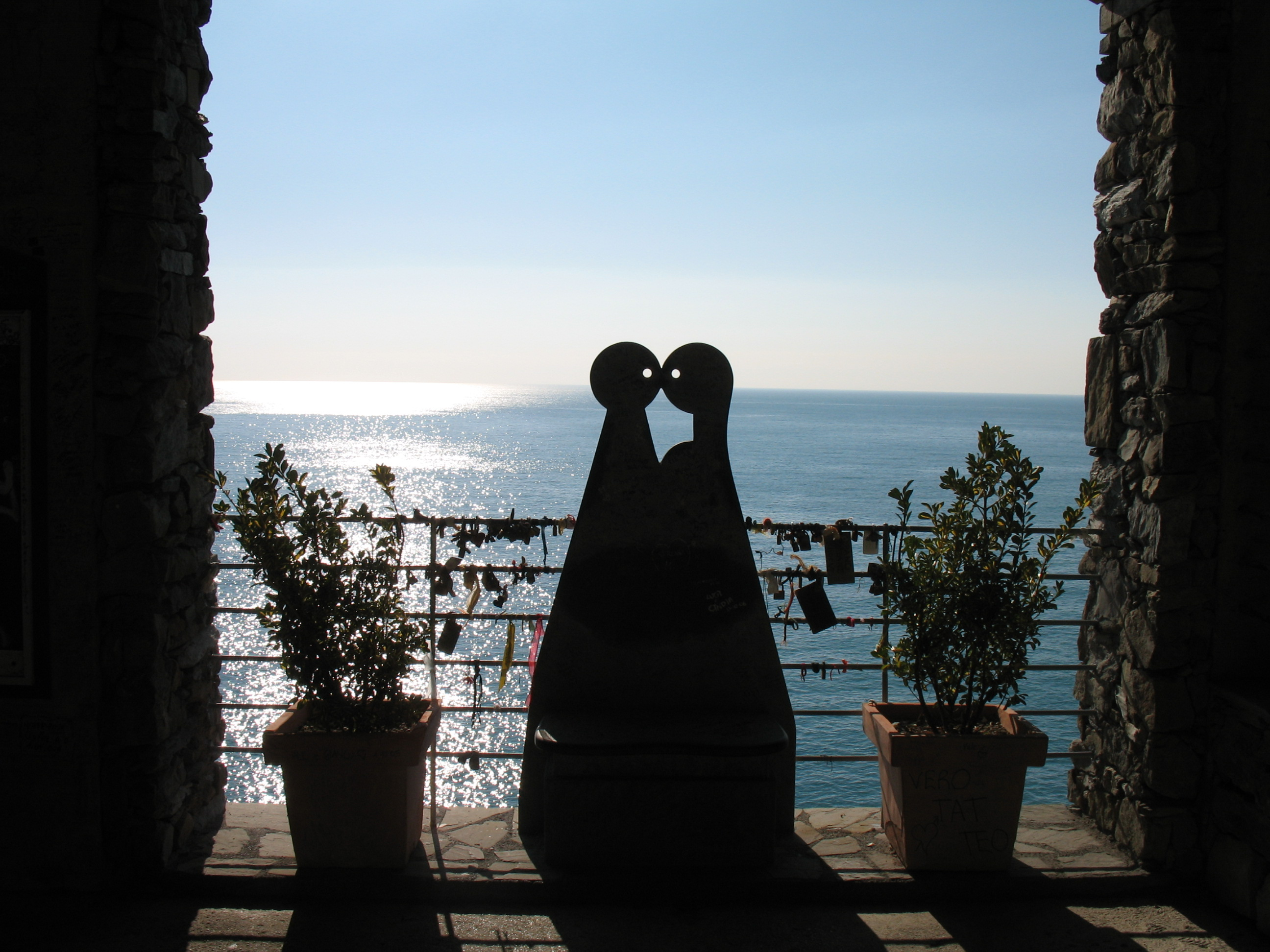 Immagine dalle Cinque Terre: Via dell'Amore, Tunnel dell'Amore, Manarola Tunnel